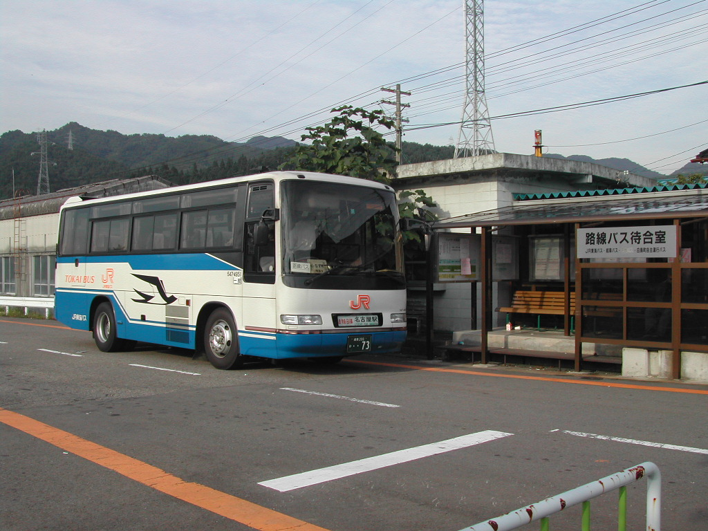 美濃白鳥駅にて、2002-9-21撮影